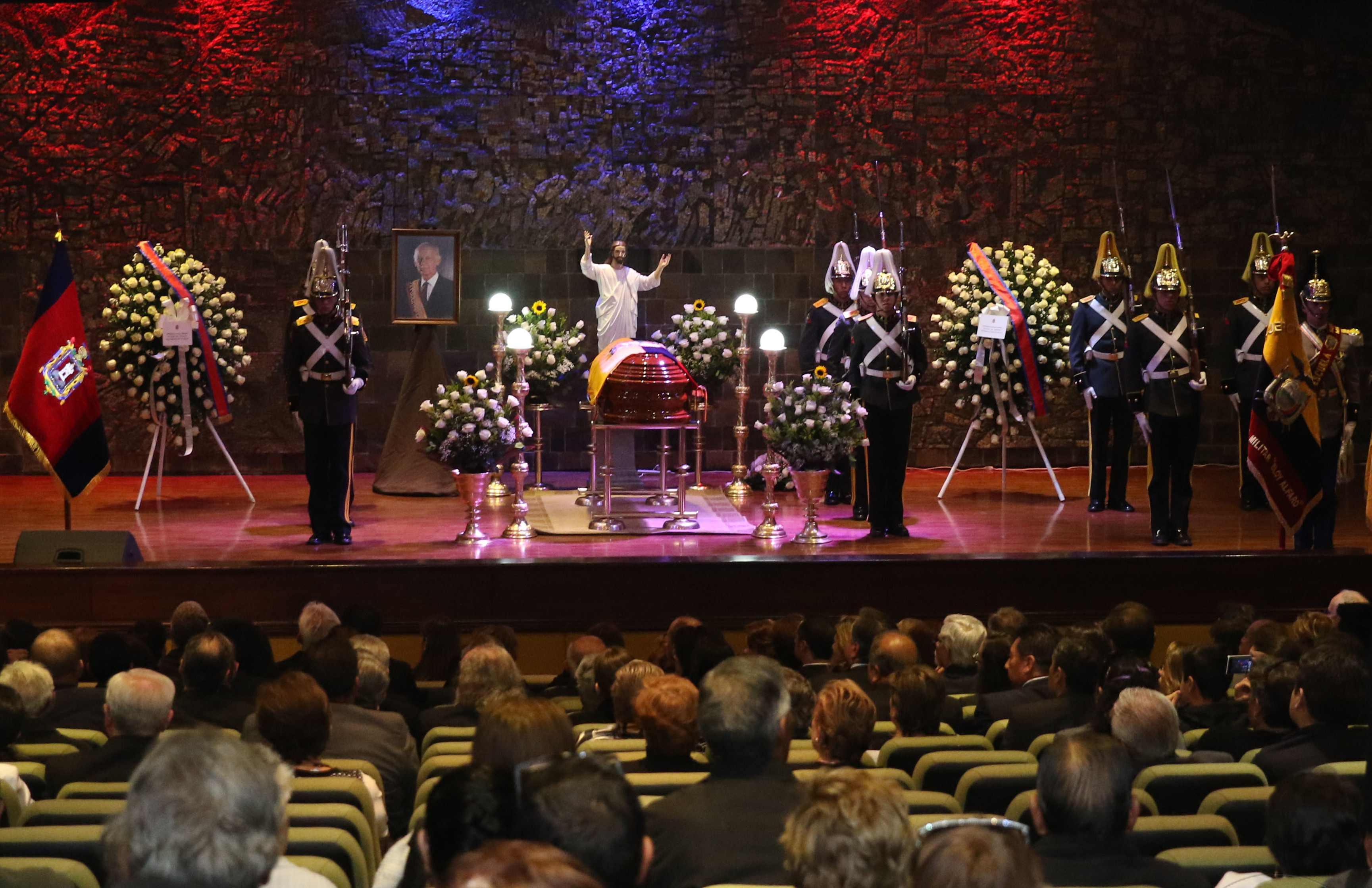 Quito, 16 nov (Andes).- Sepelio del ex presidente de la República Sixto Durán Ballén en el Salón de la Ciudad. ANDES/Micaela Ayala V.